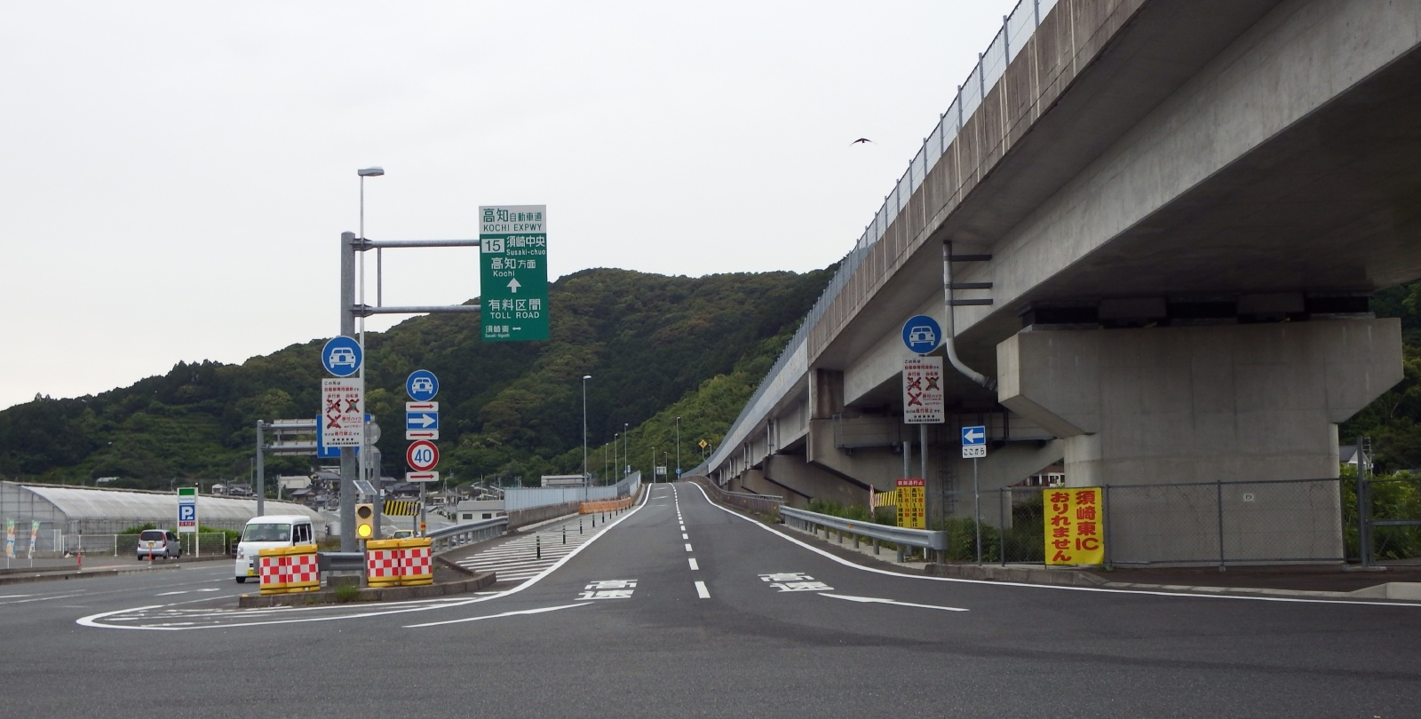 須崎中央インターチェンジ